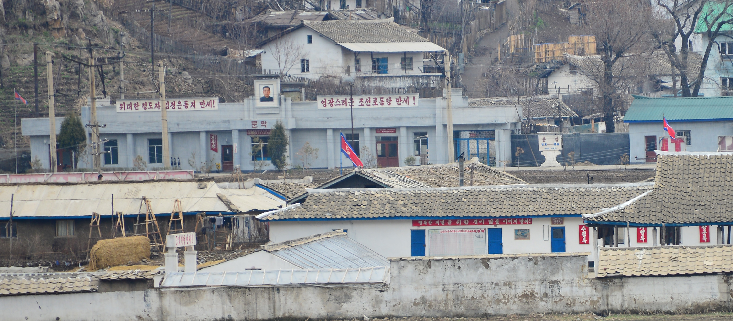 巡道工出品 photo by Xundaogong Pukpu Line (Hyesan Manpho Chongnyon Line) 文岳駅 문악역 Munak 惠山满浦青年铁路 文岳站